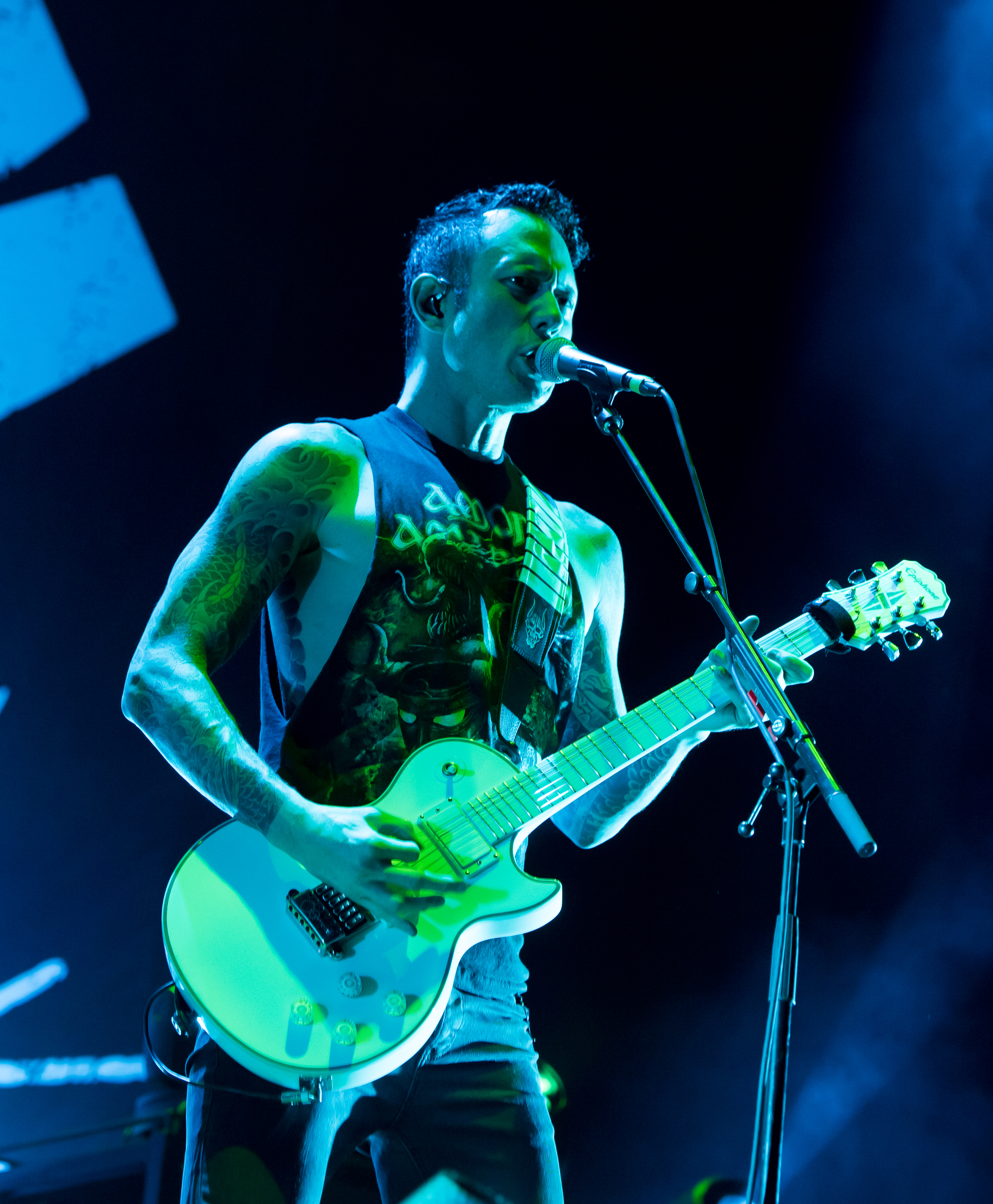 Trivium live beim Reload Festival 2017